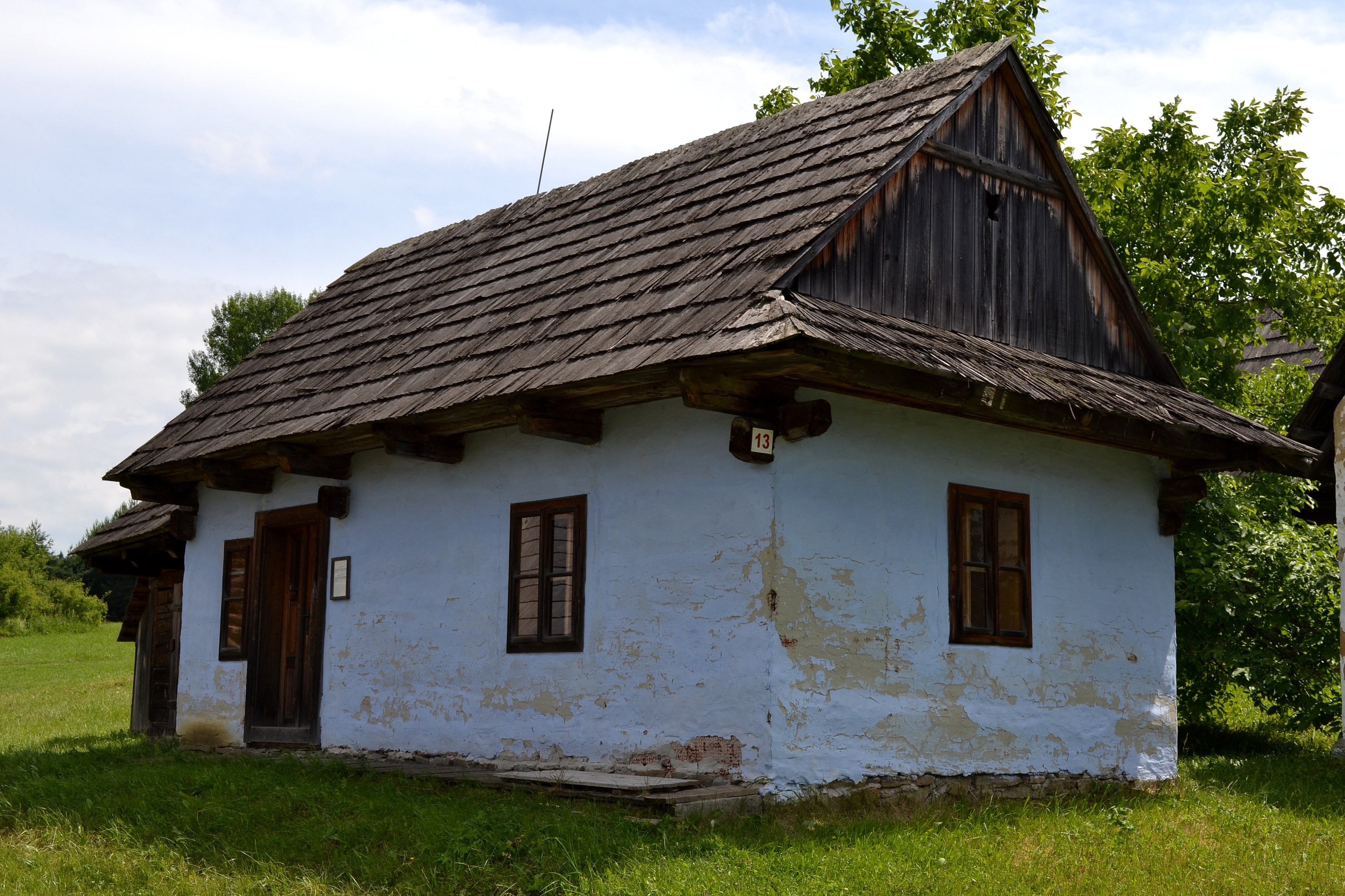 Usadlosť zo Slovian (okr. Martin) v Múzeu slovenskej dediny v Martine